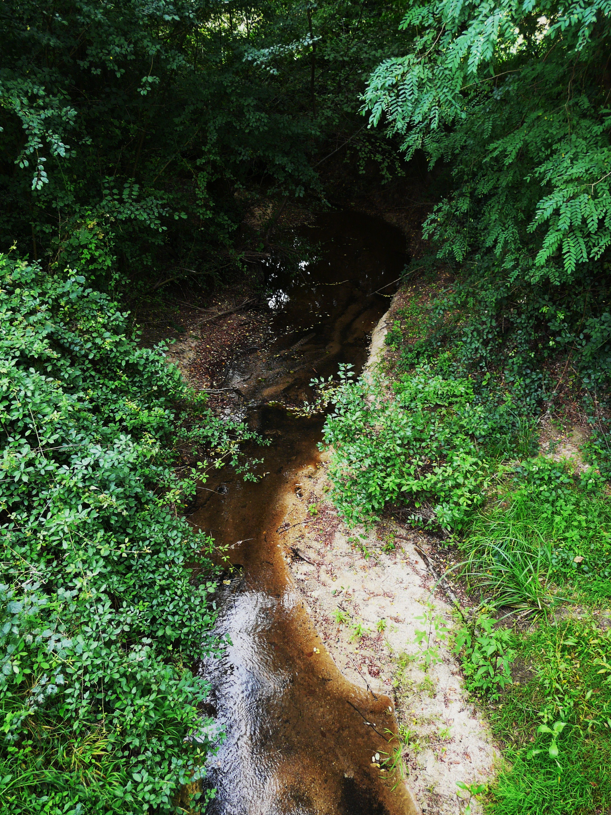 Le Grolet, en aval du pont de la route départementale 3, marque la limite entre Saint-Martin-l'Astier (à gauche) et Saint-Laurent-des-Hommes (à droite).